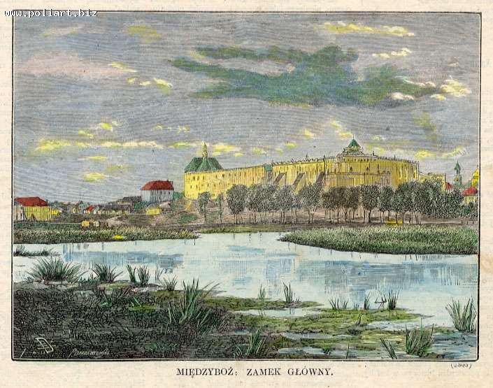 Замок в Меджибожі: Замок в Меджибожі